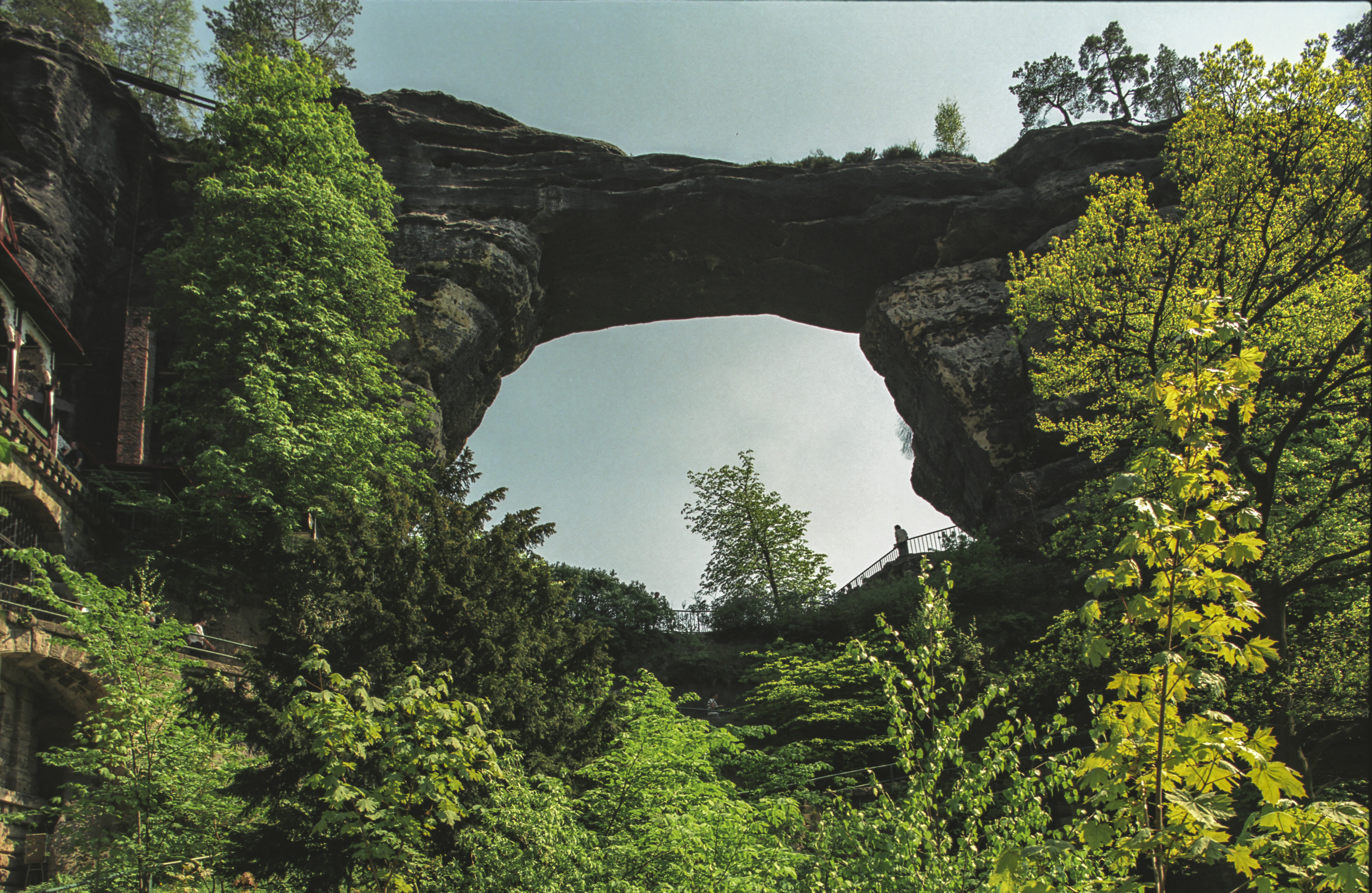 Pravčická brána